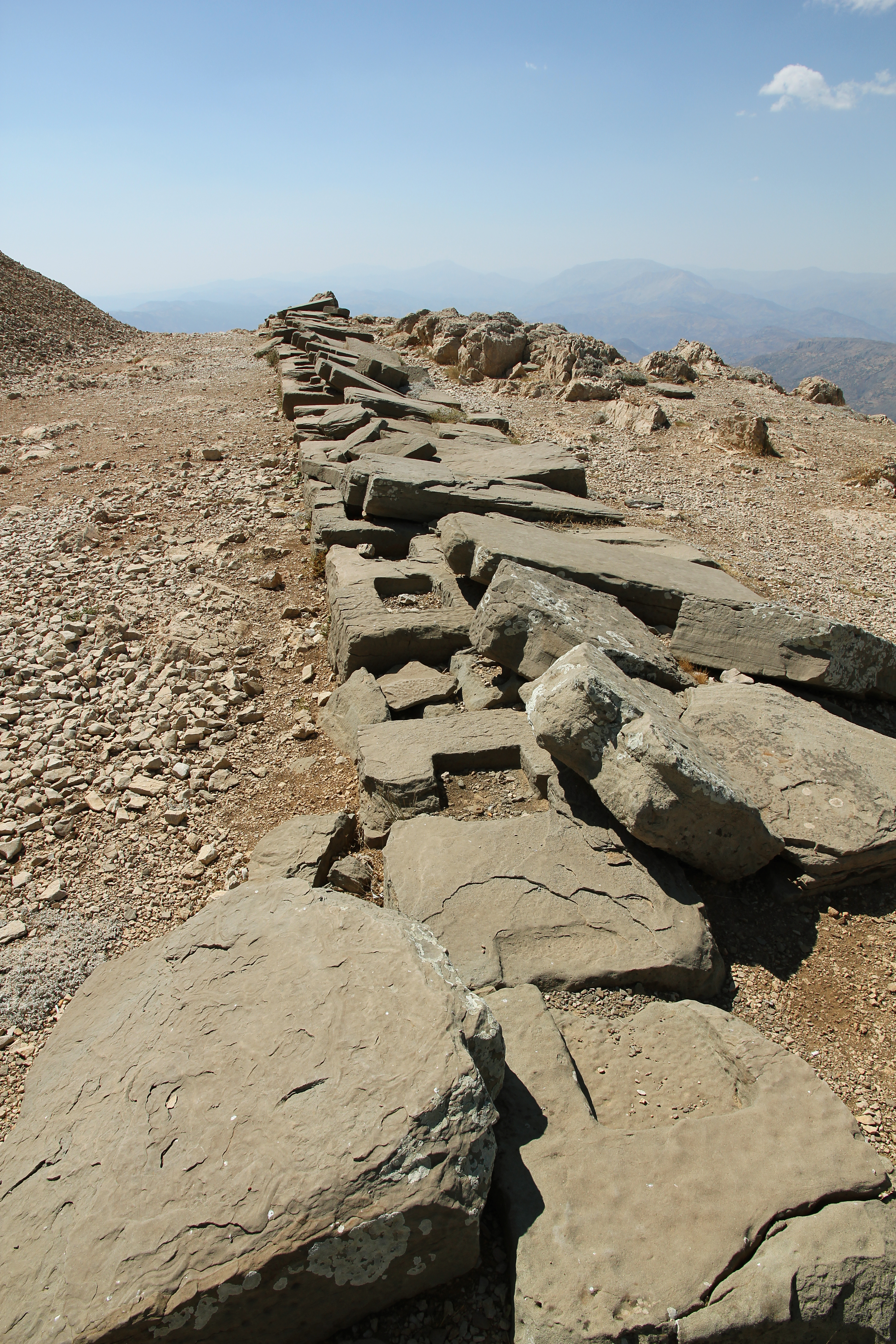 Sockel auf der Nordterrasse, Nemrut Dağı, Südosttürkei